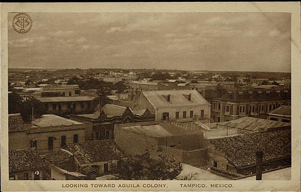 Colonia Aguila Tampico